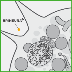 Відсутність або зниження активності ферменту TPP1 пов'язано з накопиченням запасного матеріалу в лізосомах, що пов'язано з дисфункцією нейронів і загибеллю клітин.